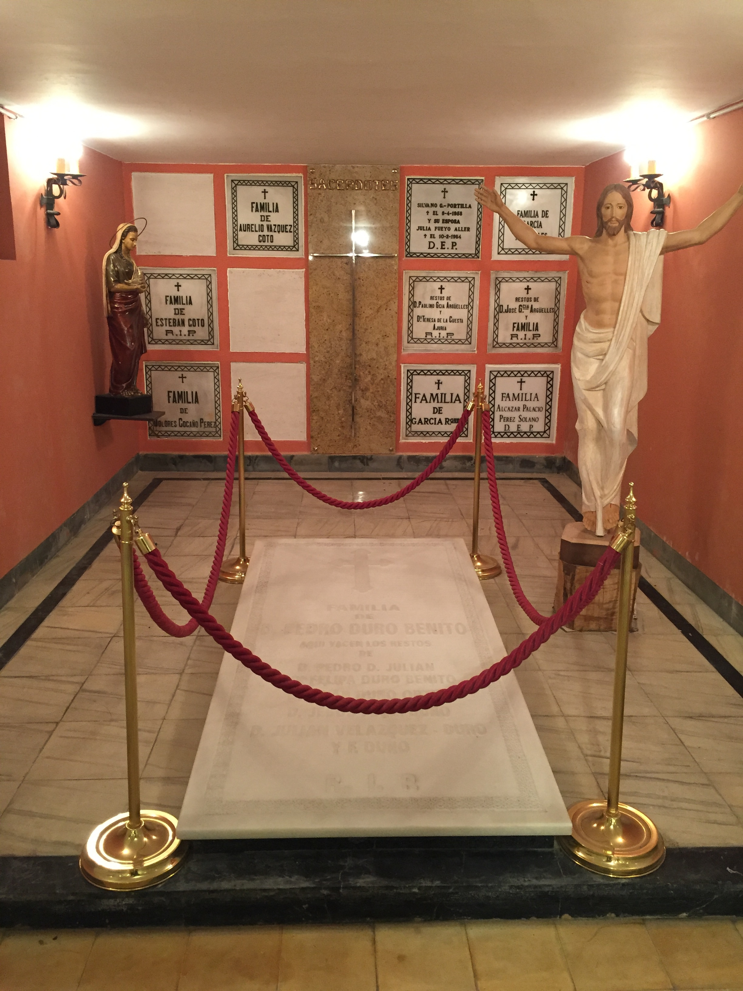 Cripta de la Iglesia San Pedro de La Felguera donde se encuentra la tumba de Pedro Duro y Familia